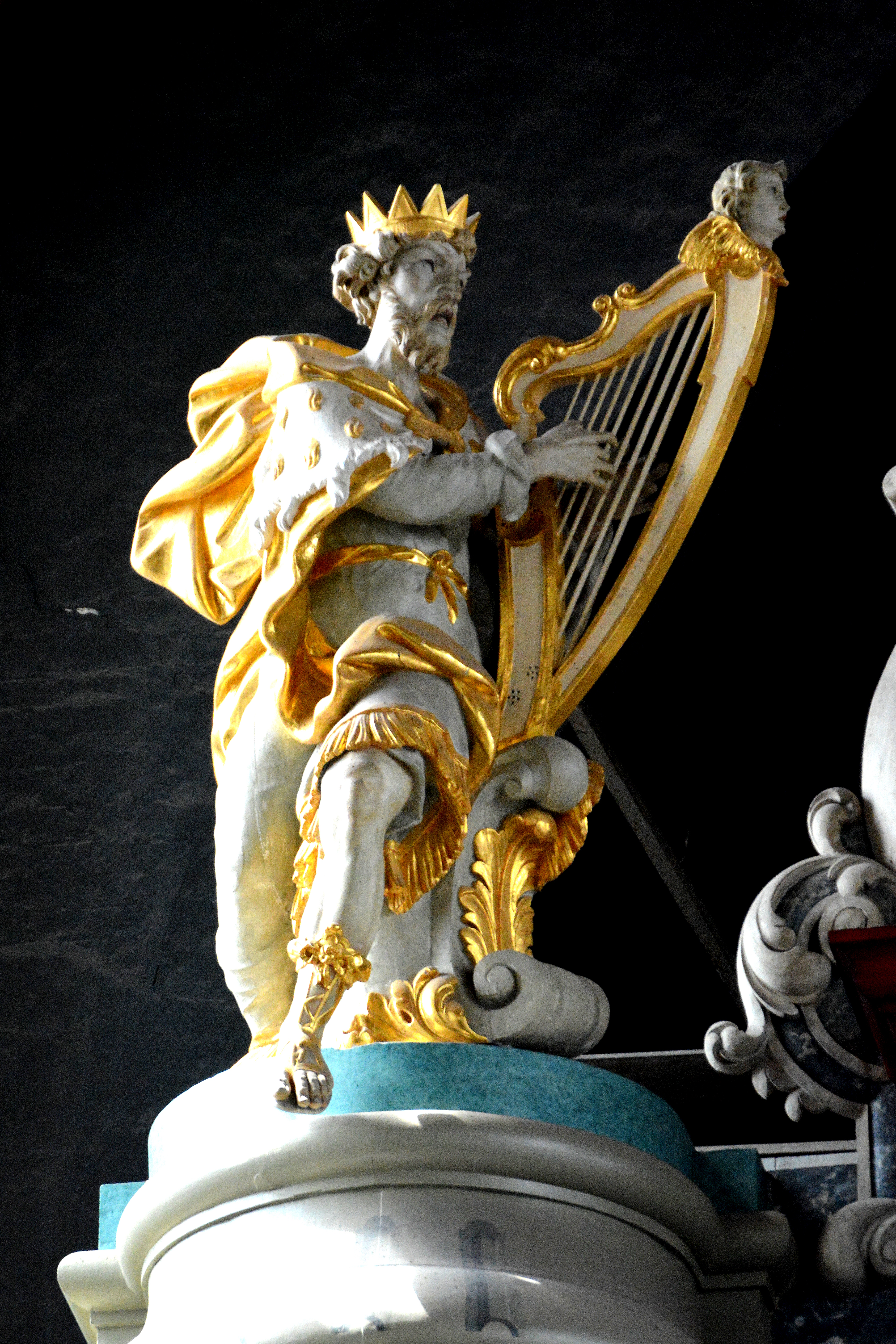 Haarlem, Grote- of Bavokerk, orgelbeeld koning David